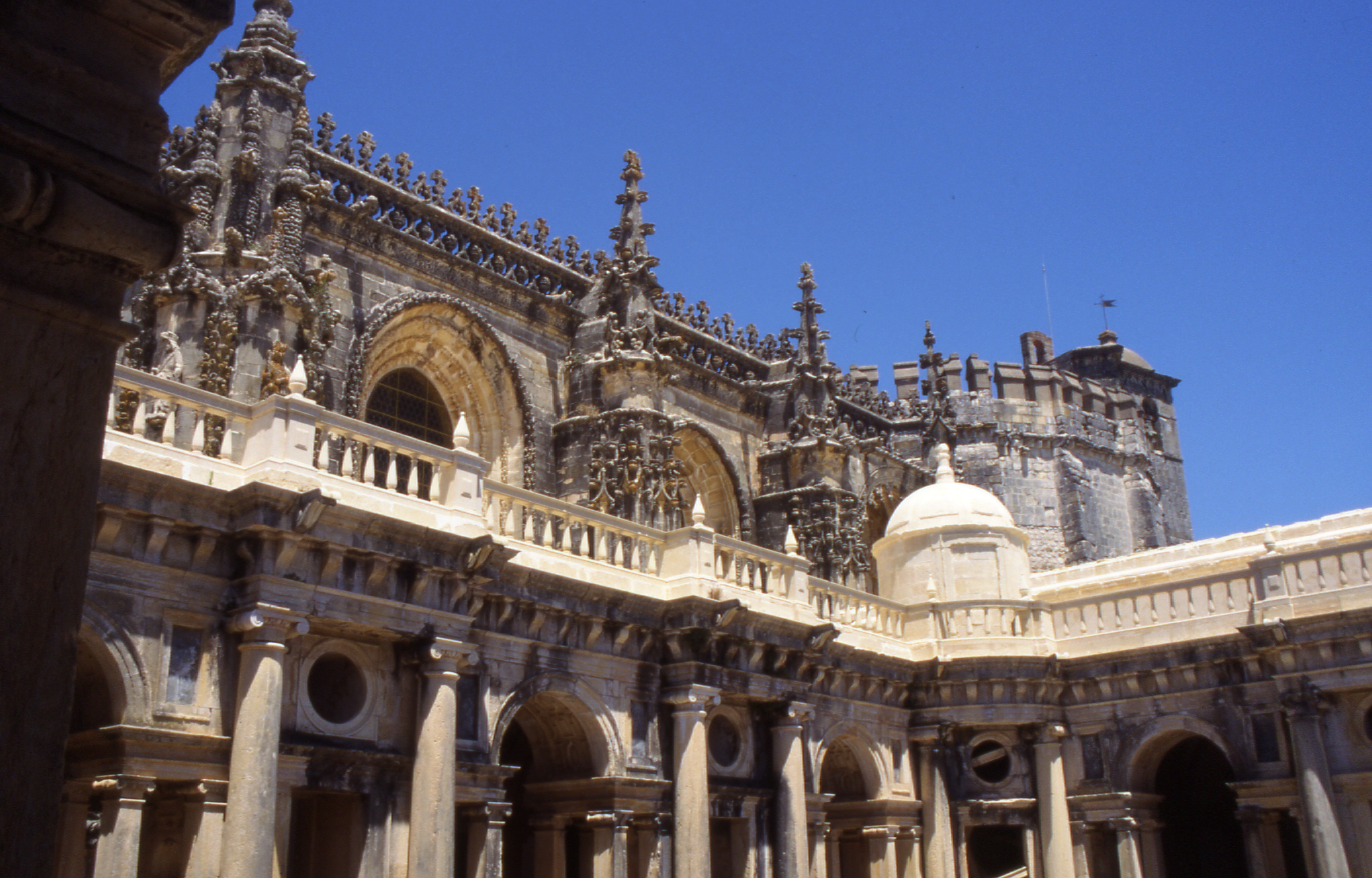 Tomar / Convento de Cristo Ansicht 1